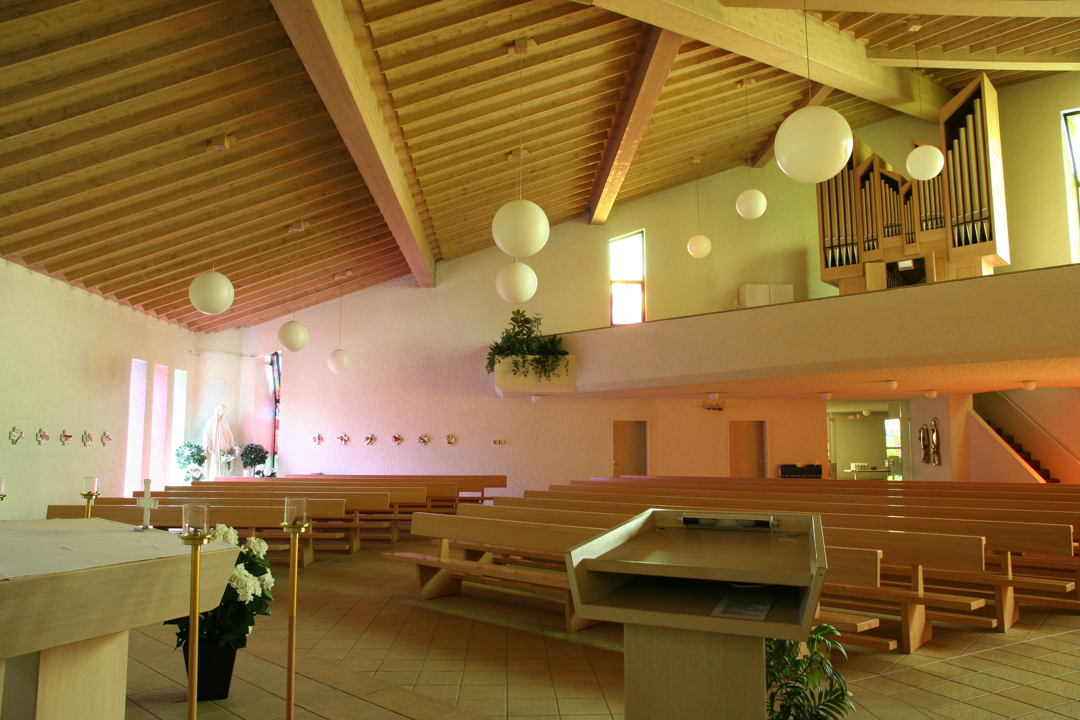 Römisch-katholische Kirche St. Plazidus und Sigisbert Kleinandelfingen, Blick zur Empore